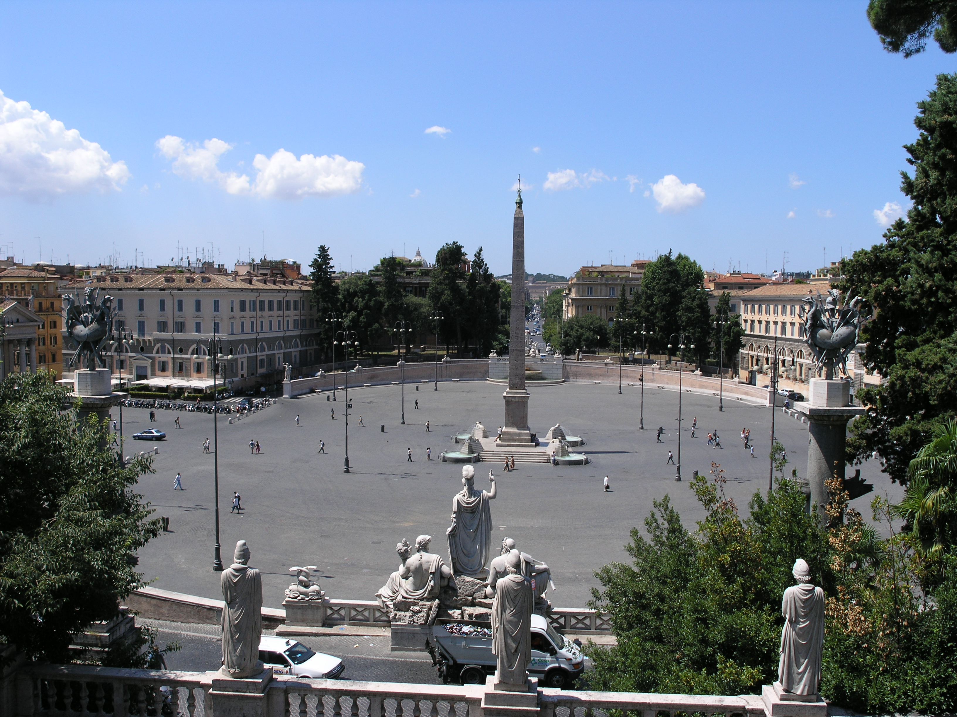 Piazza del Popolo, Roma, Italy